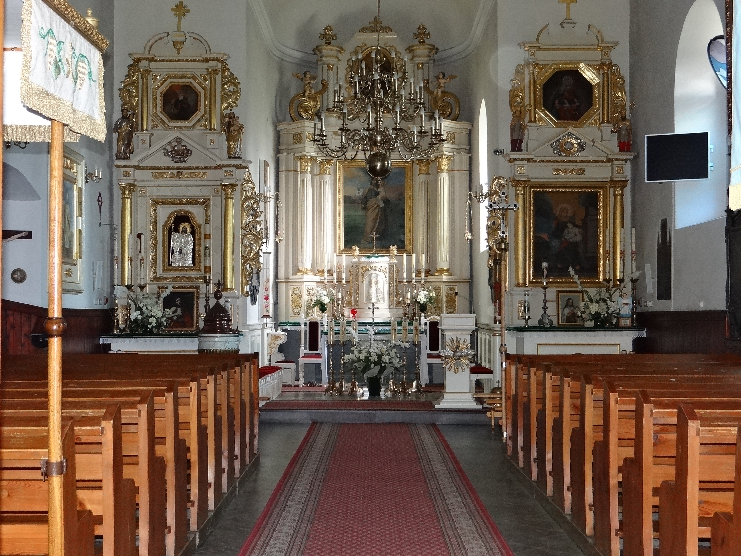 Sanka, kościół par. p.w. Jakuba Starszego, 1618-1624, 1783